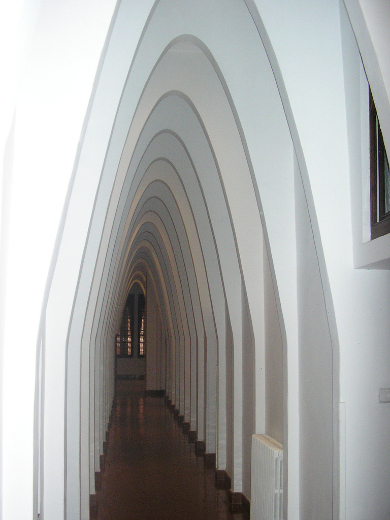 Arcos del colegio de las Teresianas de Gaudí